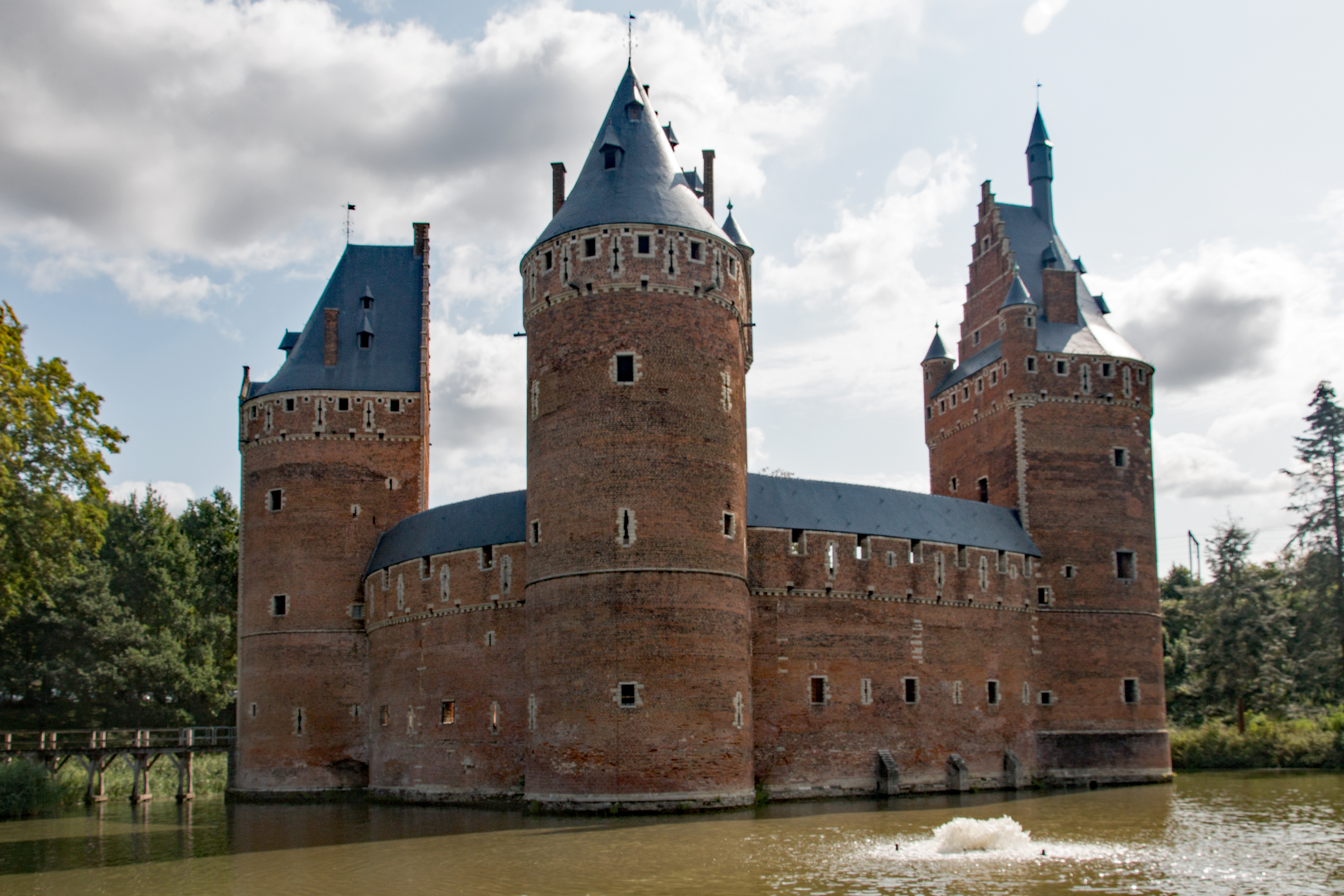 Kasteel van Beersel Lotsestraat 63 This photo of immovable heritage has been taken in the Flemish Region